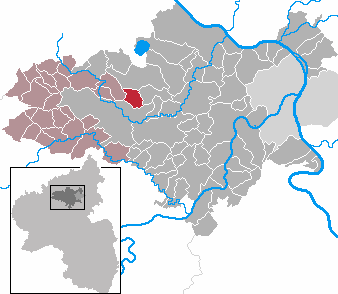 Kottenheim in Rhineland-Palatinate - district Mayen-Koblenz